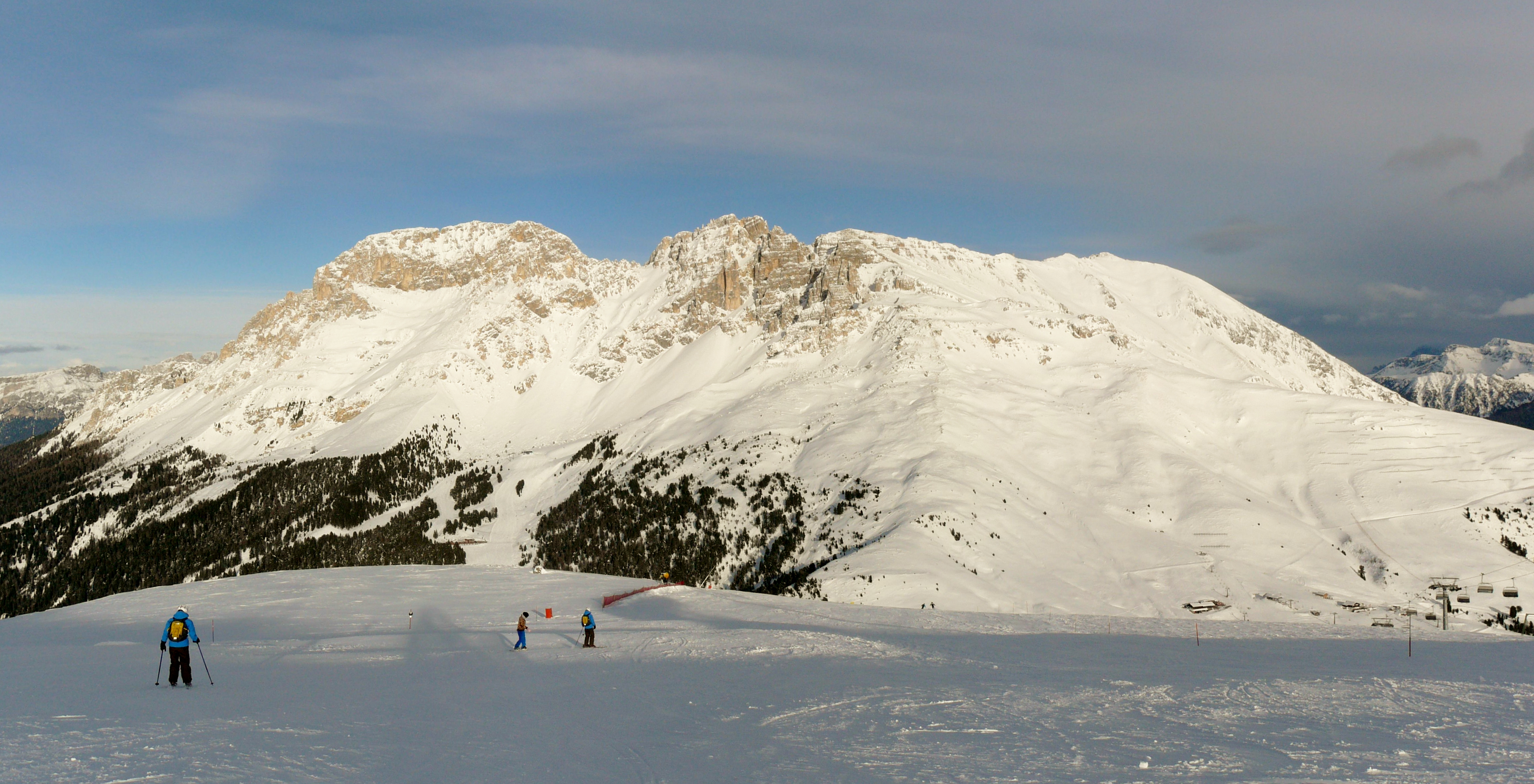 Latemar during the winter